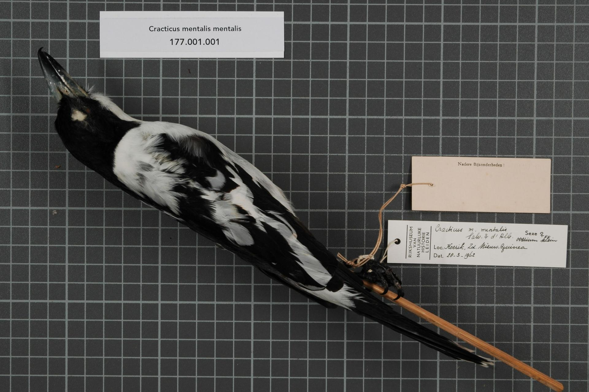 Cracticus mentalis mentalis Salvadori & D'Albertis, 1876